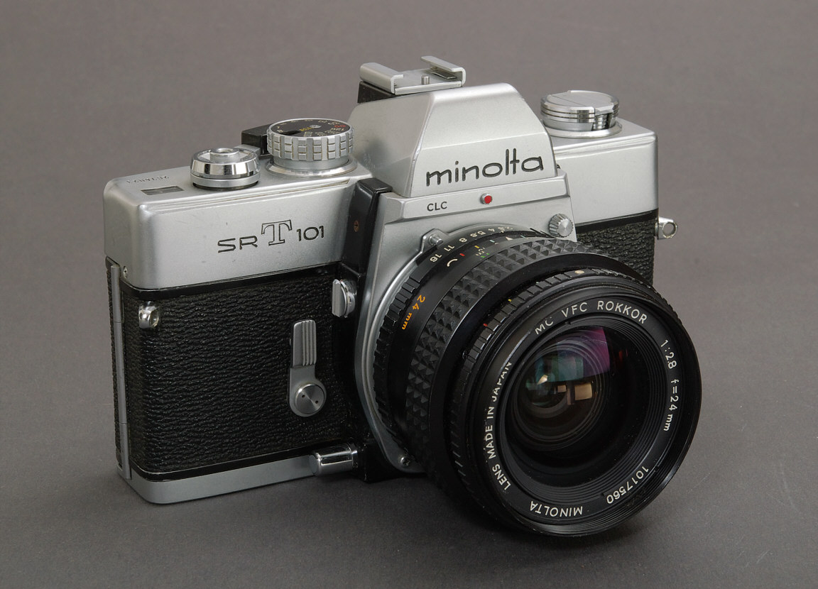 Minolta SRT 101 in der ersten Ausführung ohne X-Kontakt im Zubehörschuh, mit Knebel zur manuellen Spiegelarretierung